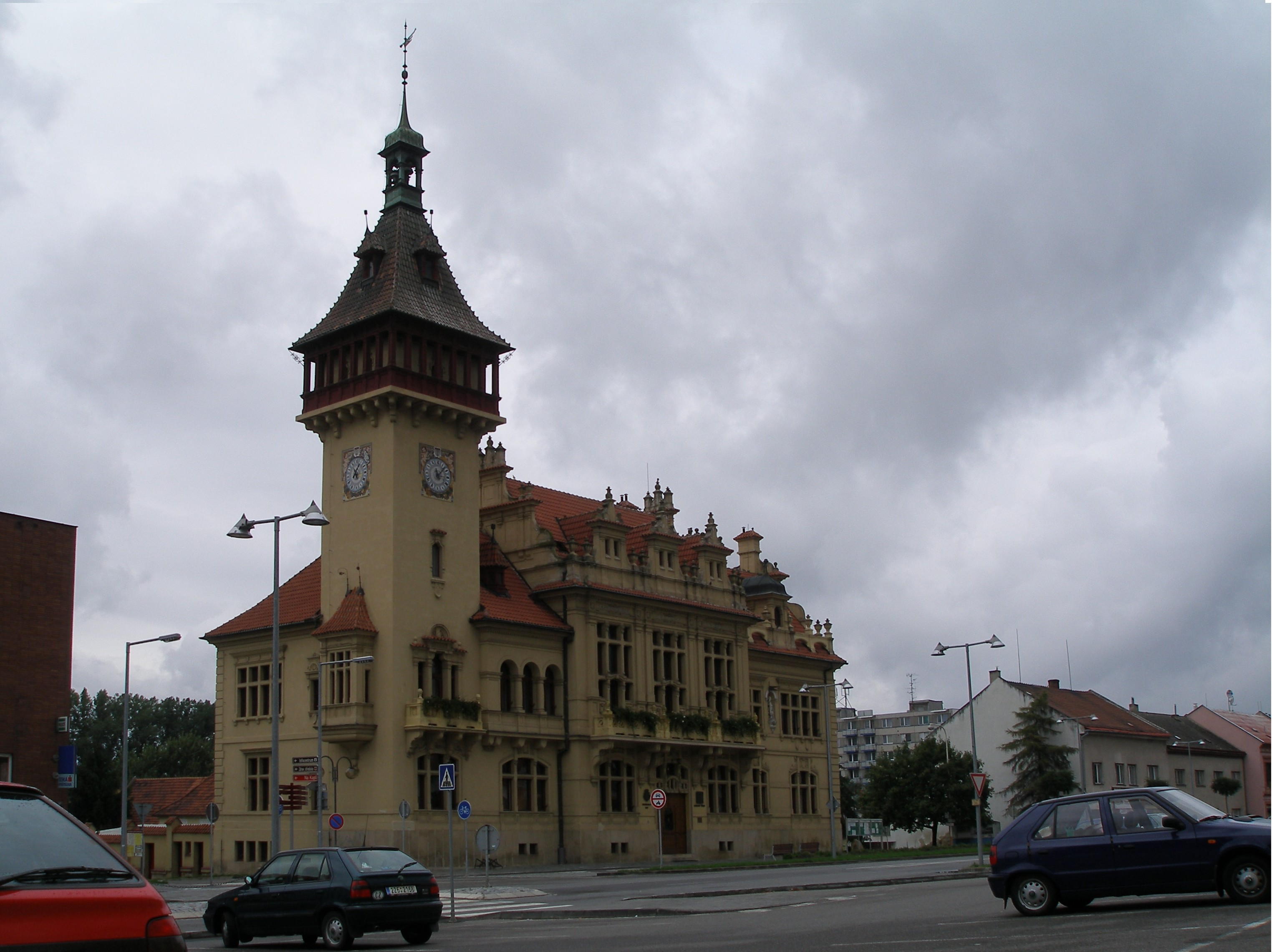 Napajedla, Hotel de la Ville